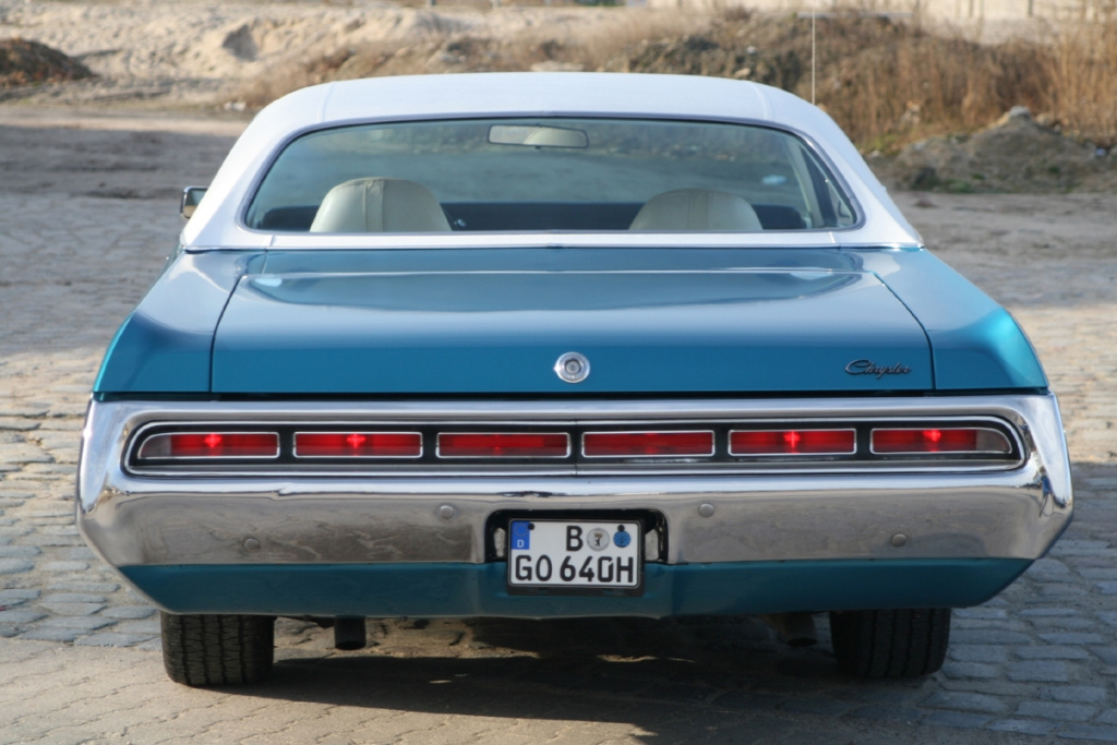 1971 Chrysler 300